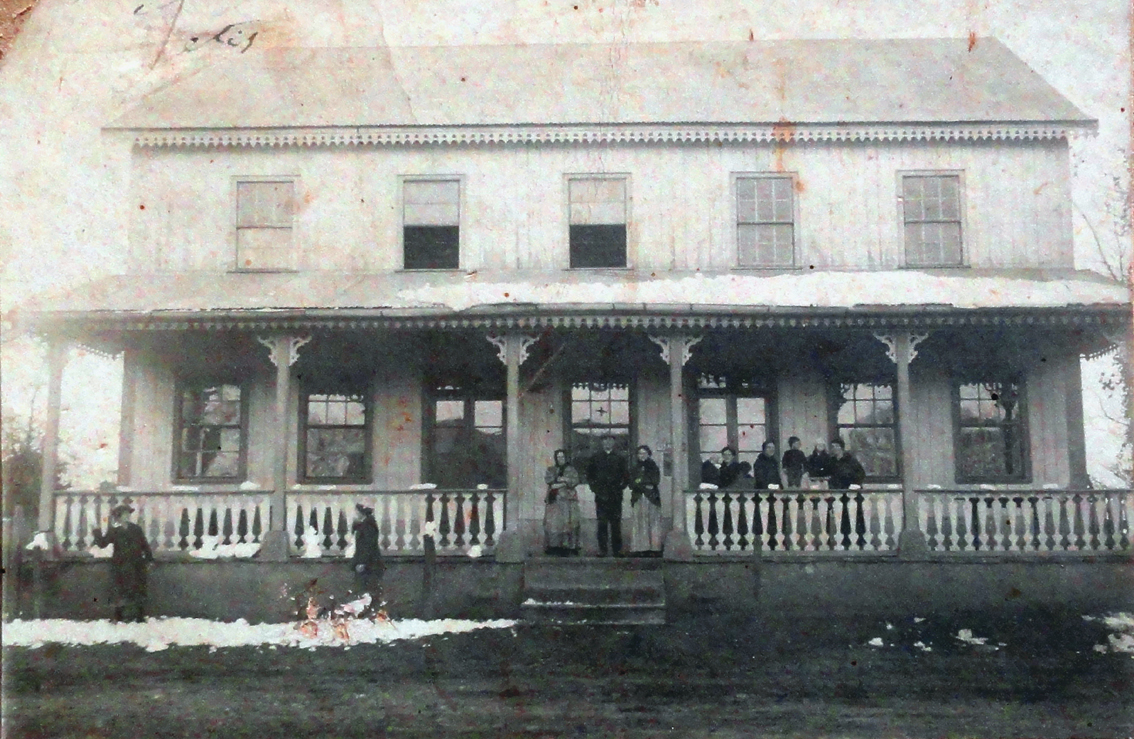 João Paternoster e sua família na frente do Hotel Recreio Familiar, de sua propriedade.